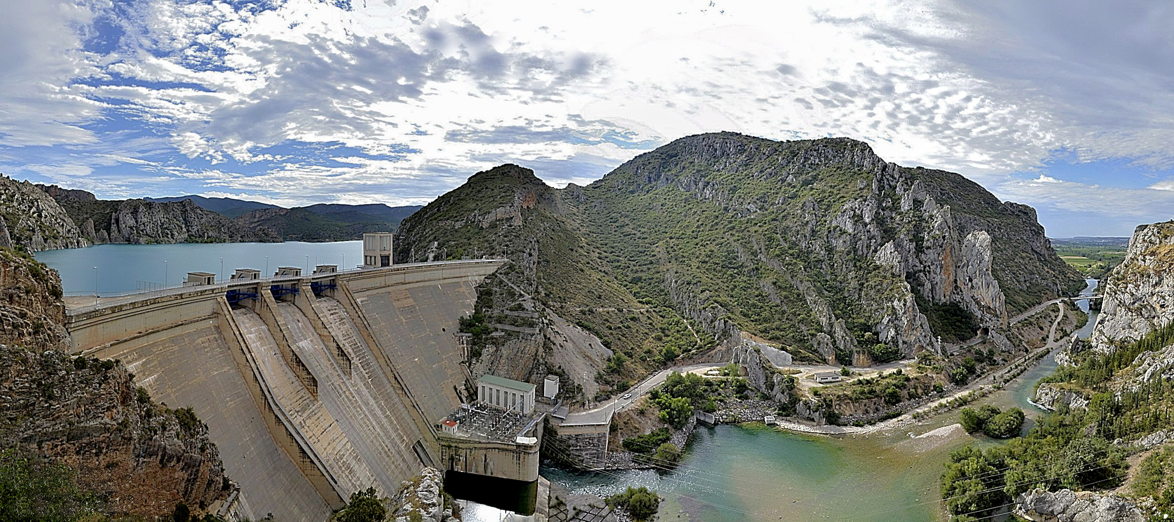 Presa del embalse o pantano de Santa Ana.